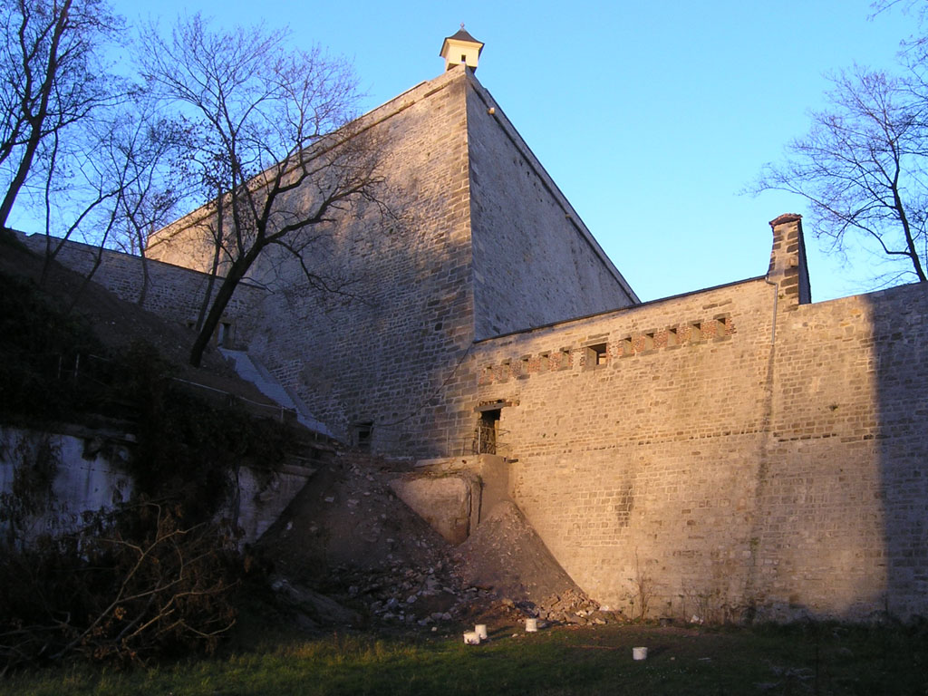 Rückseite des Kanonenhofs (errichtet 1830) der Zitadelle Petersberg in Erfurt